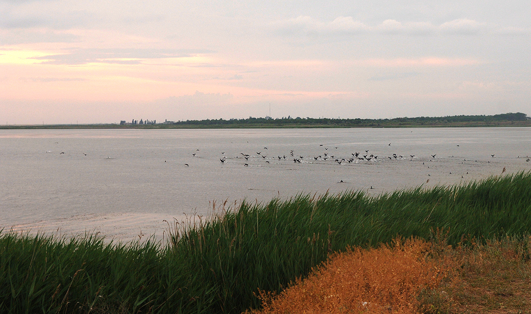 Утлюкский лиман Азовского моря в районе впадения рек Большой и Малый Утлюк. На противополодном берегу видно село Давыдовка Акимовского района